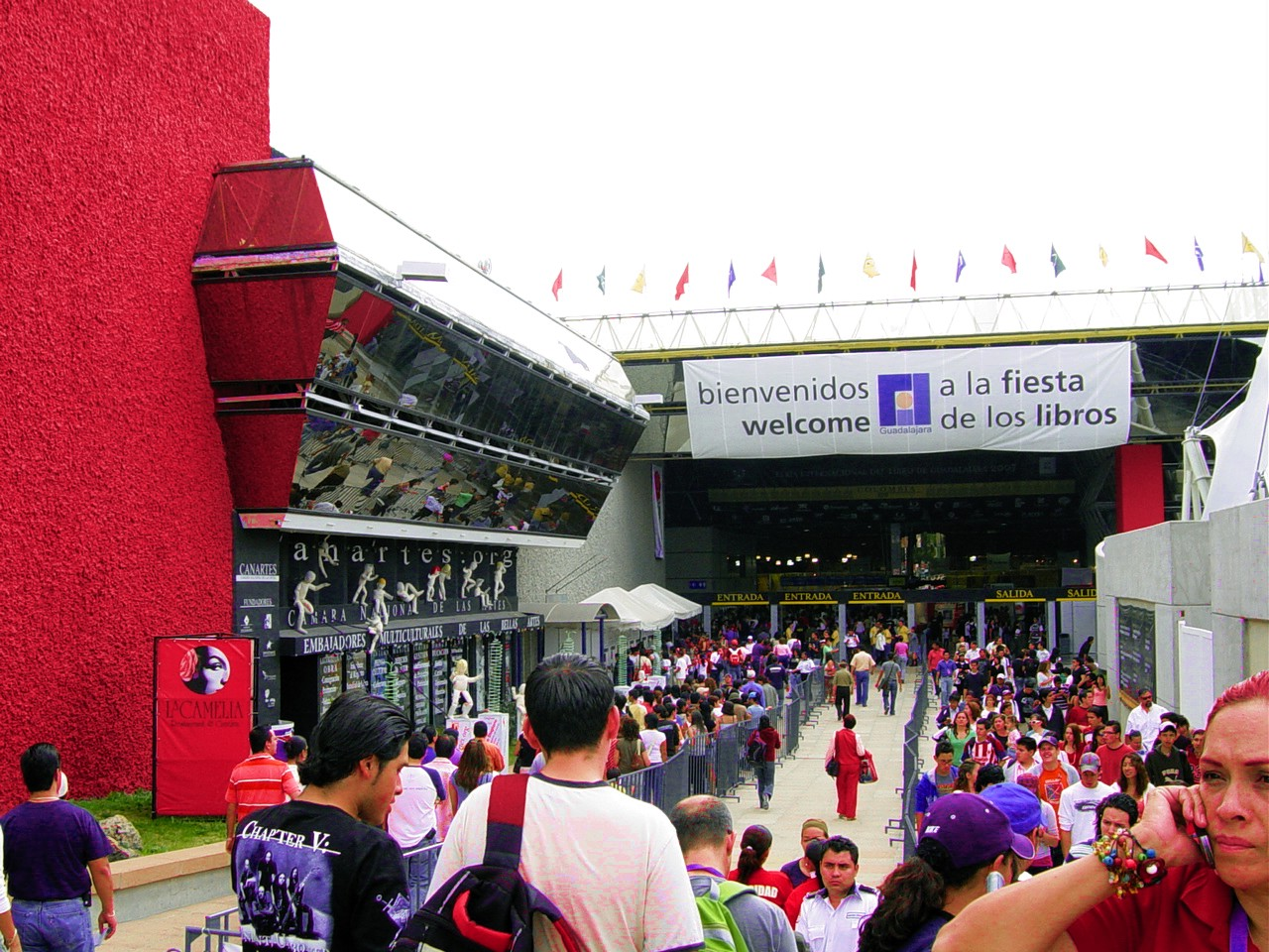 Entrada principal Feria Internacional del Libro 2007